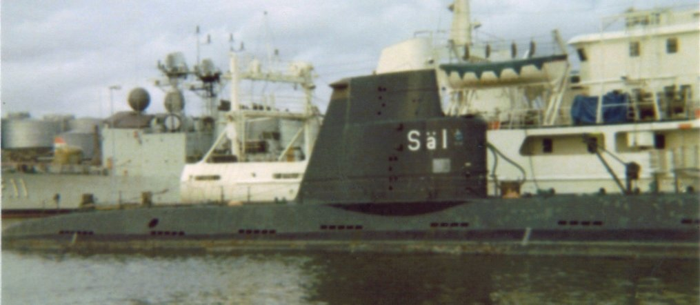 HMS Sälen i malpåse Nya Varvet, Göteborg 1977